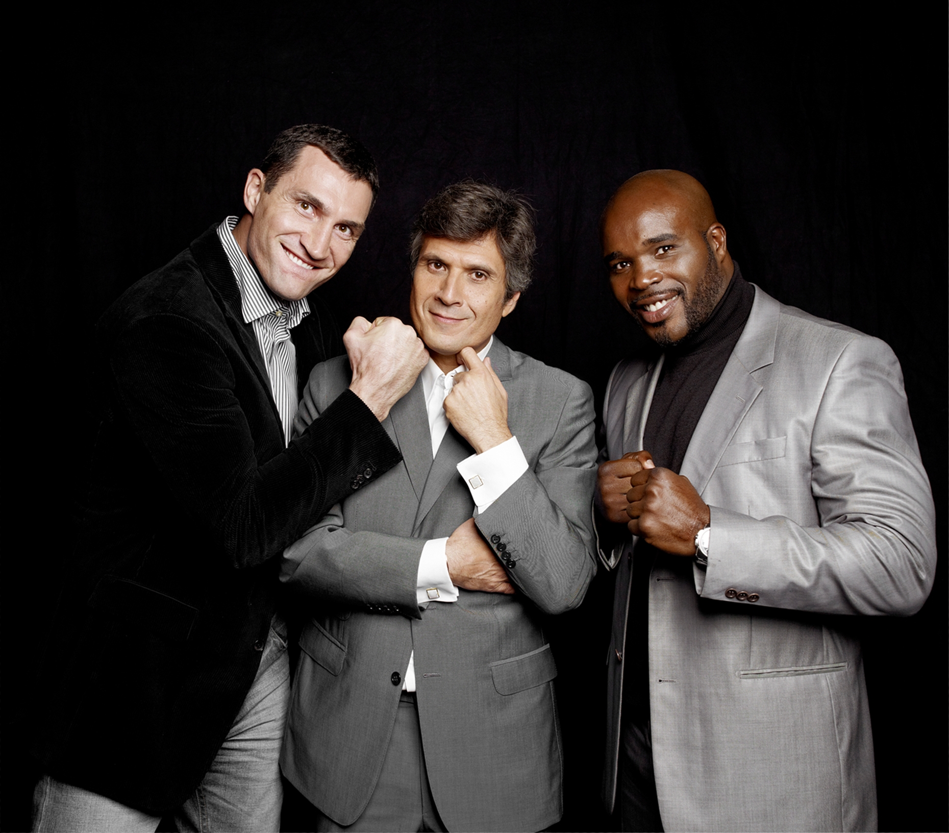 Wladimir Klitschko, Jean-Philippe Lustyk et Jean-Marc Mormeck, octobre 2011